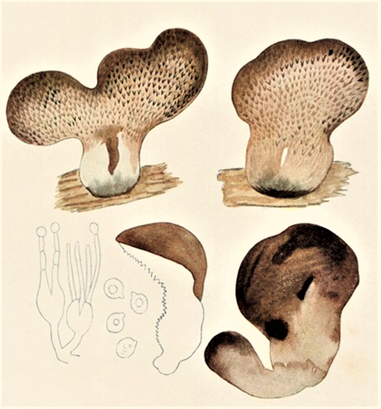 Giacomo Bresadola: Tremellodon gelatinosum f. flava